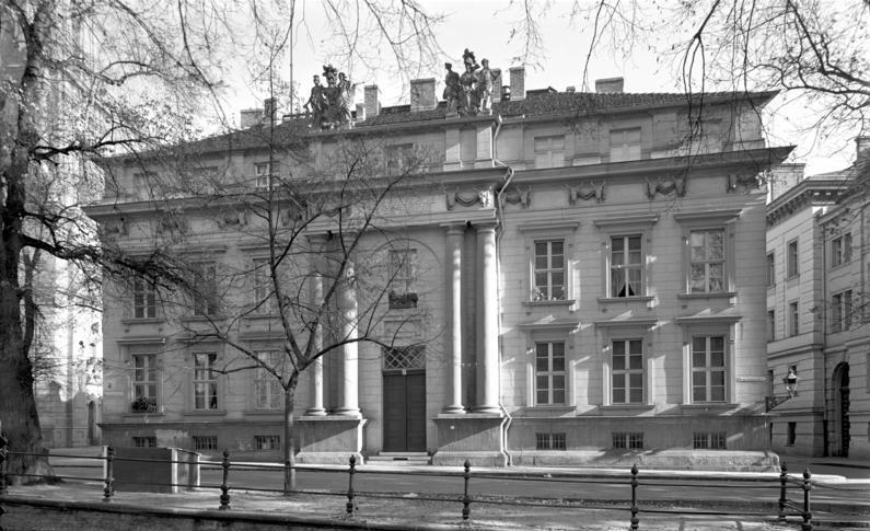 Potsdam